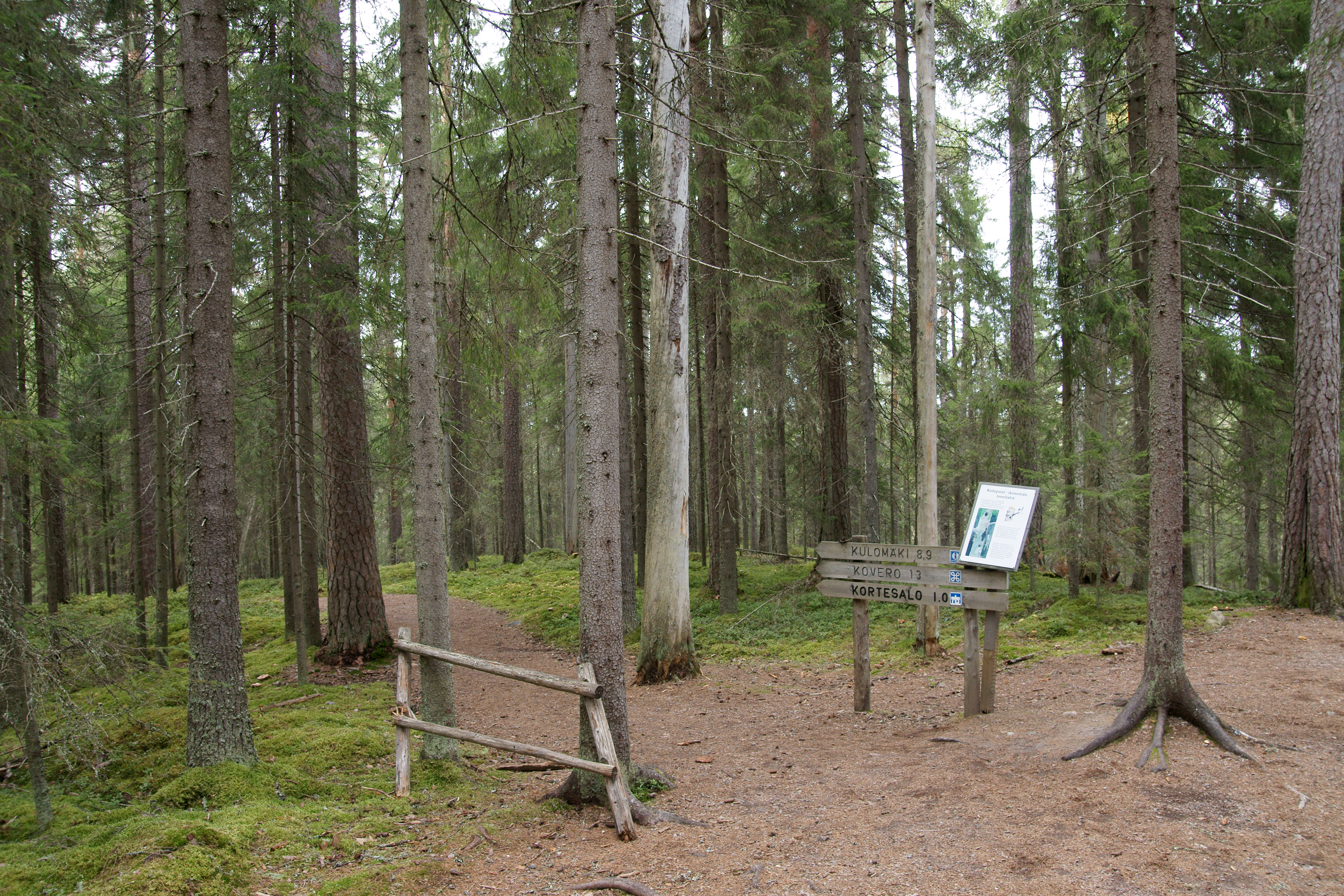 Kuva Multiharjun vaellusreitiltä.